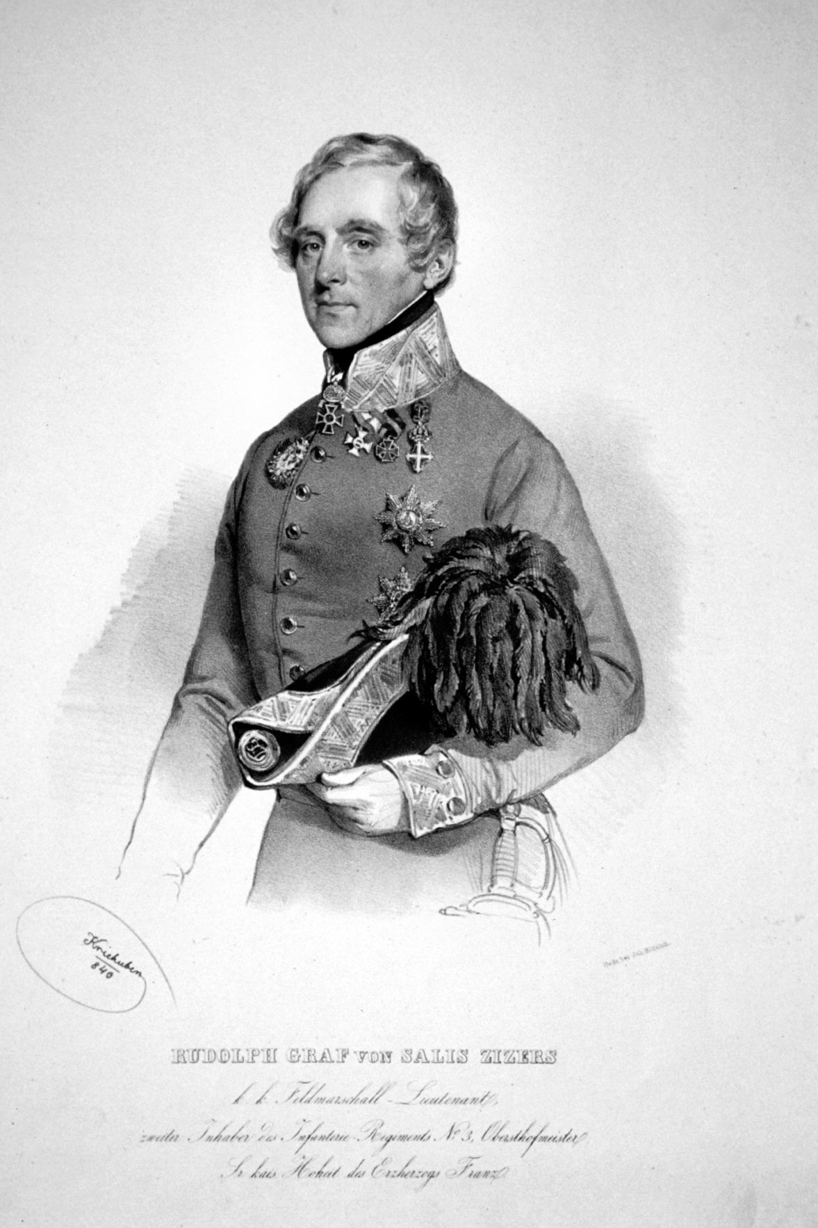 Rudolf Salis-Zizers (1779-1840), Graf, Feldmarschallleutenant, Ritter des Maria-Theresien-Ordens, Obersthofmeister des Erzhzg. Franz Carl Lithographie von Josef Kriehuber, 1840